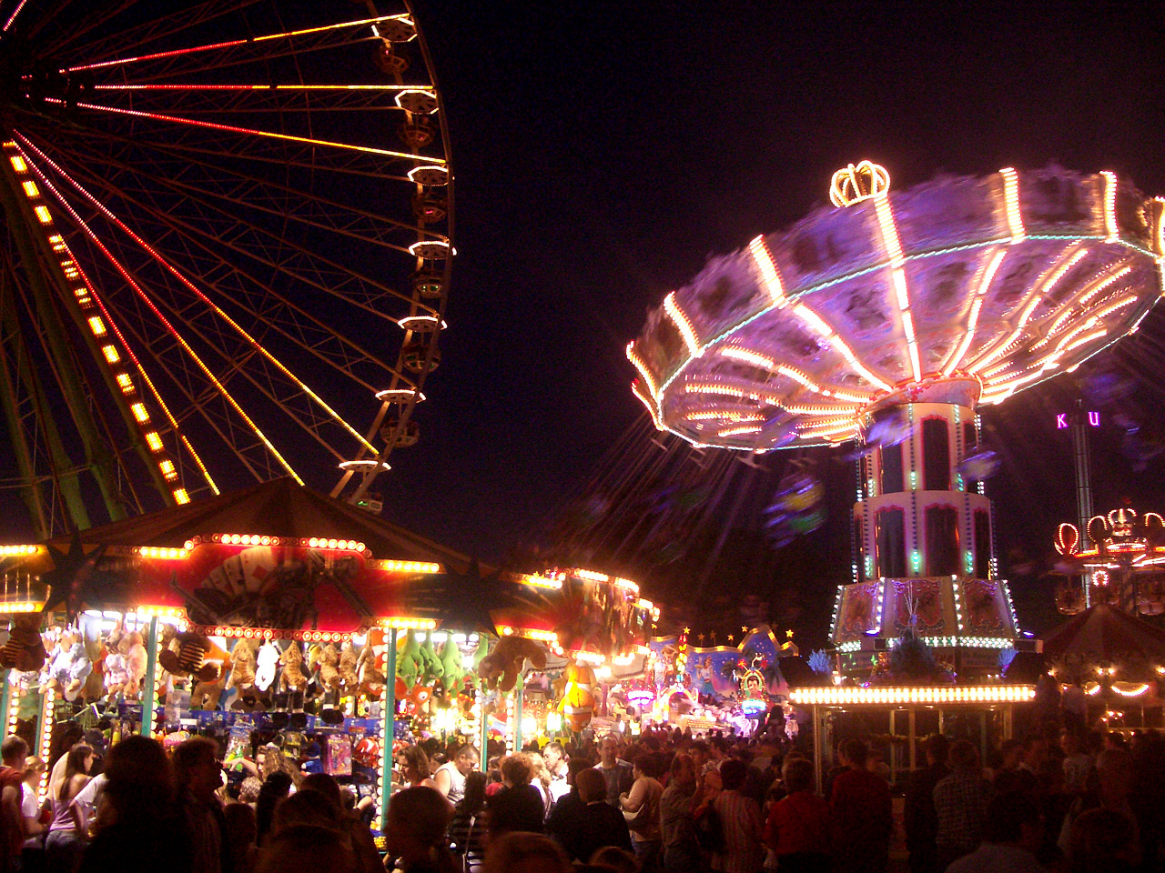 Ravensburg, Germany: Rutenfest, Rummelplatz